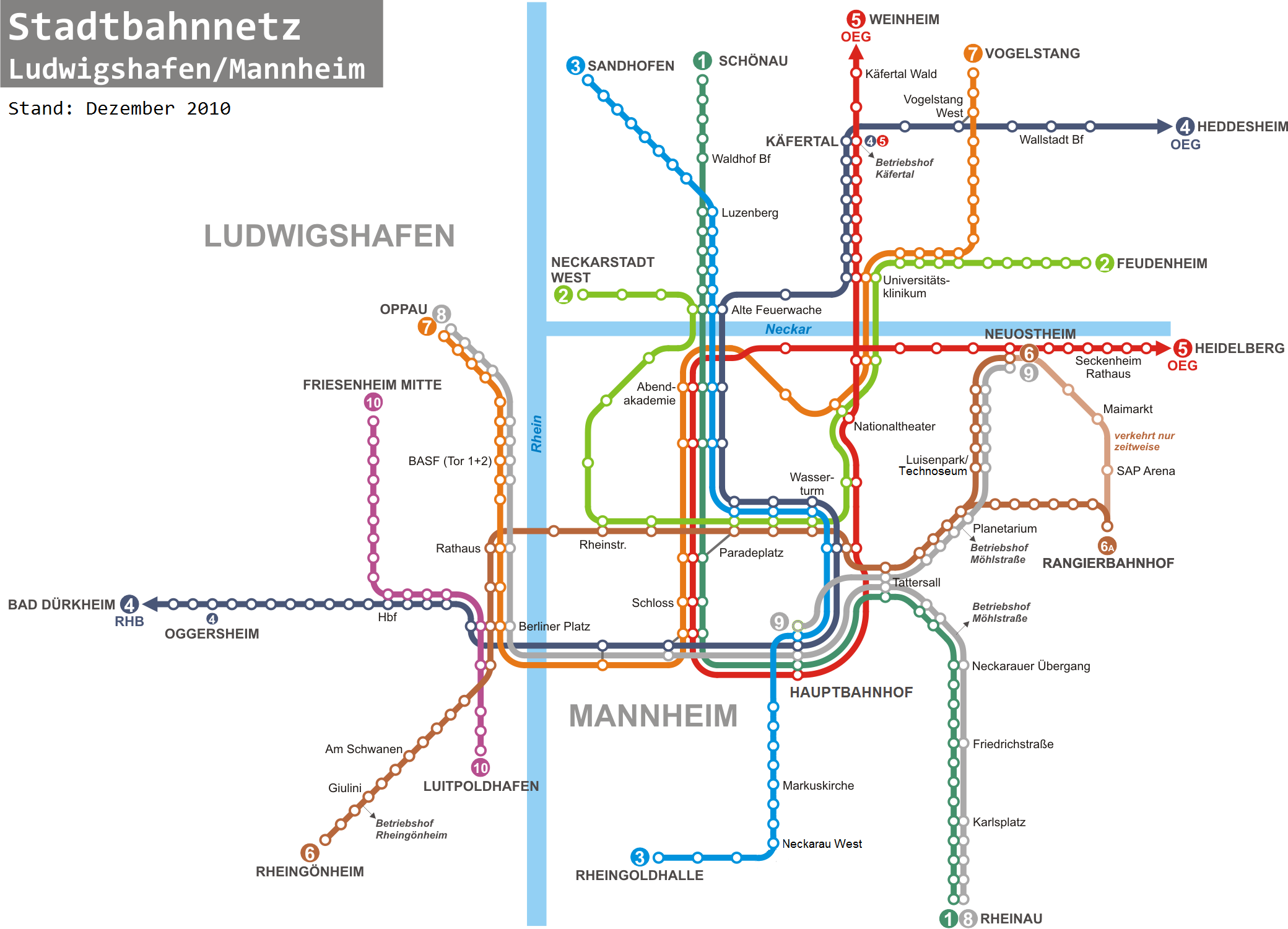 schematischer Liniennetzplan der Stadtbahn Mannheim und Ludwigshafen